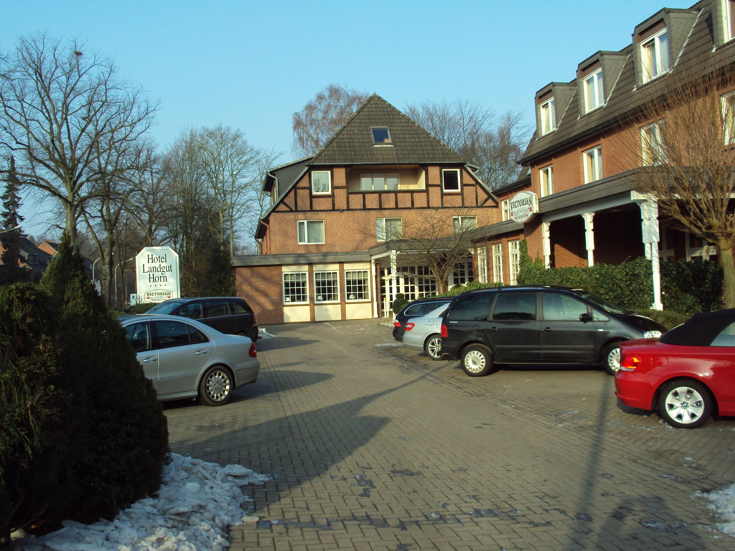 Very nice hotel